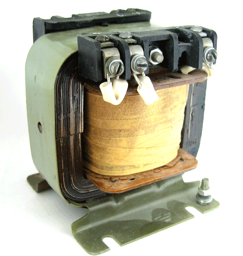 Трансформатор силовой ОСМ 0,16 220/36/5. Made in Russia transformer marked OSM 0.16 220/36/5